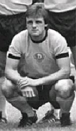 Title: Mannschaftsfoto SG Dynamo Dresden Factual corrections and alternative descriptions are encouraged separately from the original description. Additionally errors can be reported at this page to inform the Bundesarchiv. Original historic description: ADN-ZB-Häßler-16.9.80-Dresden: Fußball-Oberliga. Die Mannschaft der SG Dynamo Dresden für die Spielserie 1980-81. Stehend v.l.n.r.: Mannschaftskapitän Hans-Jürgen Dörner, Andreas Schmidt, Gerd Weber, Andreas Trautmann, Karsten Petersohn, Udo Schmuck, Christian Helm und Reinhard Häfner. Vorn v.l.n.r.: Gerd Heidler, Peter Kotte, Torhüter Jörg Klimpel, Torhüter Claus Boden, Torhüter Bernd Jakubowski, Frank Richter und Matthias Müller.